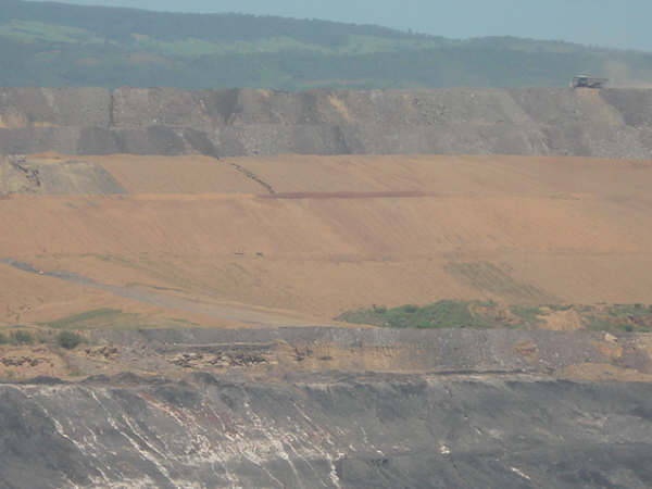 El Cerrejón Mine, Colombia